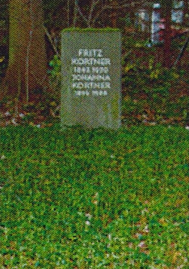 Waldfriedhof München-Johanna Kortner